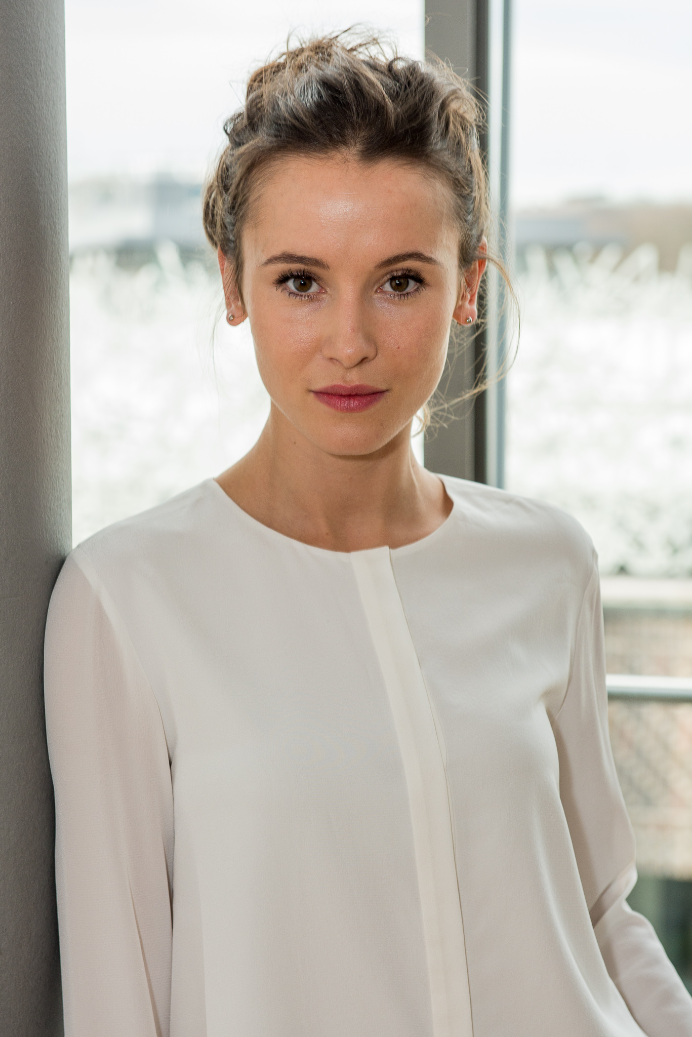 BR,Bayerischer Rundfunk,Bayerisches Fernsehen,Filmbrunch 2015,Peri Baumeister